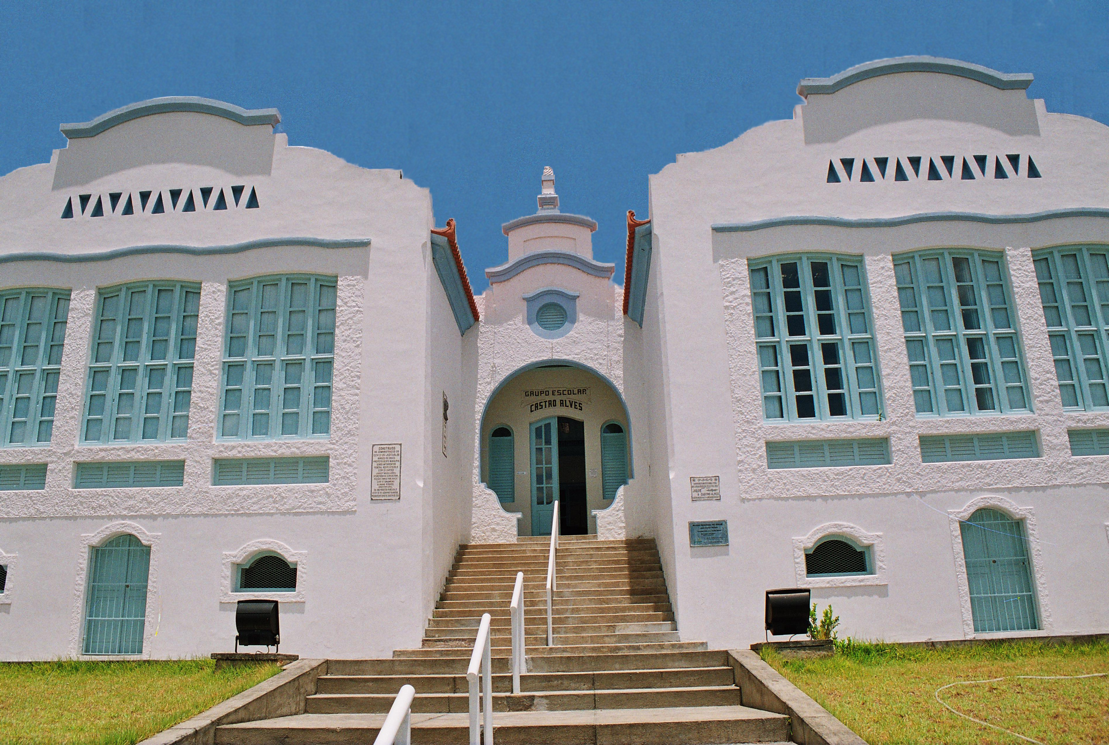 Prédio onde funcionou o Grupo Escolar Castro Alves. Foi construído pelo então interventor federal Juracy Magalhães, e inaugurado no ano de 1934. Sua fachada exibe estilo neocolonial, em voga na época. Desde 2006 abriga o Museu Histórico de Jequié.